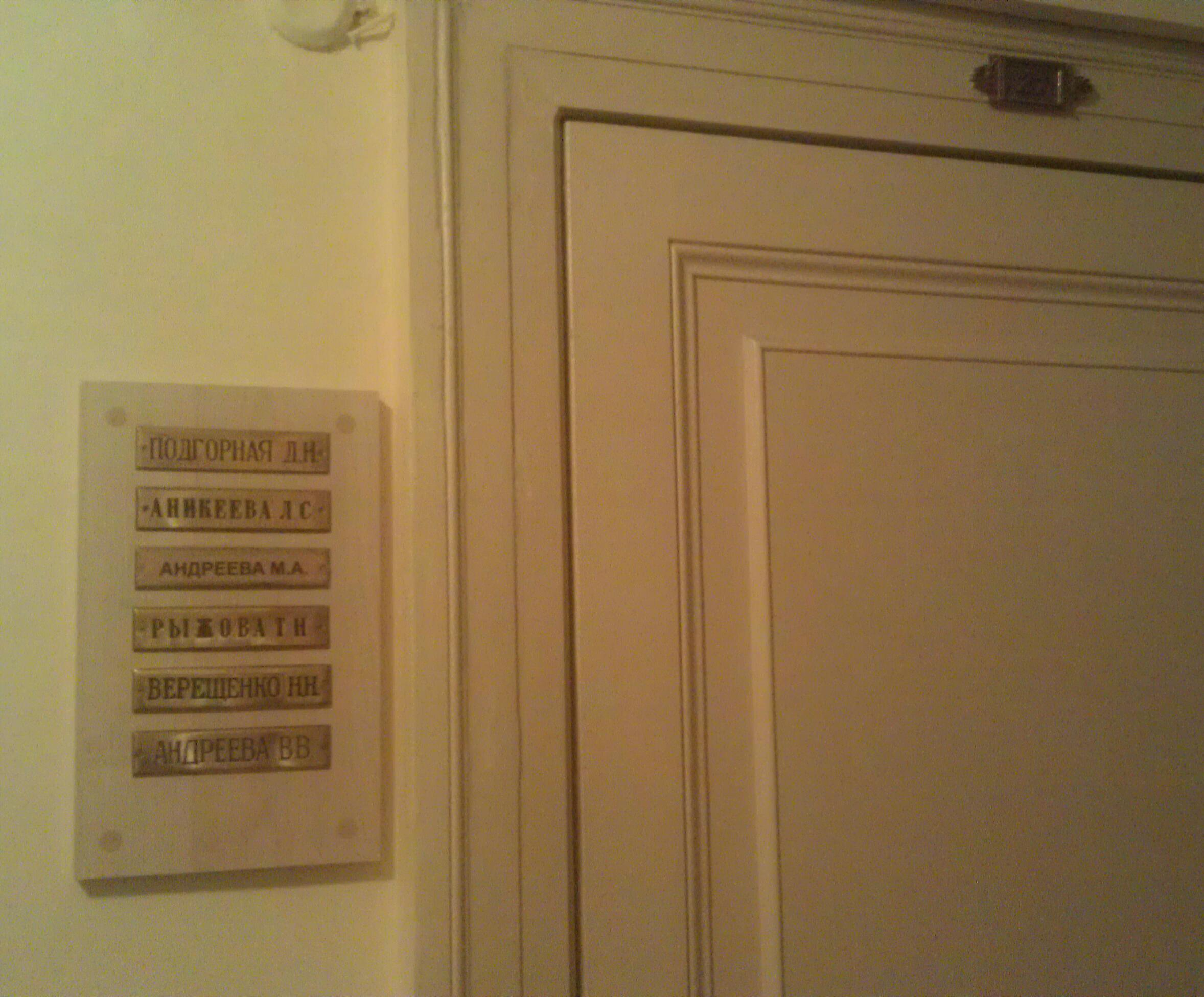 табличка обозначающая грим уборную актрисы